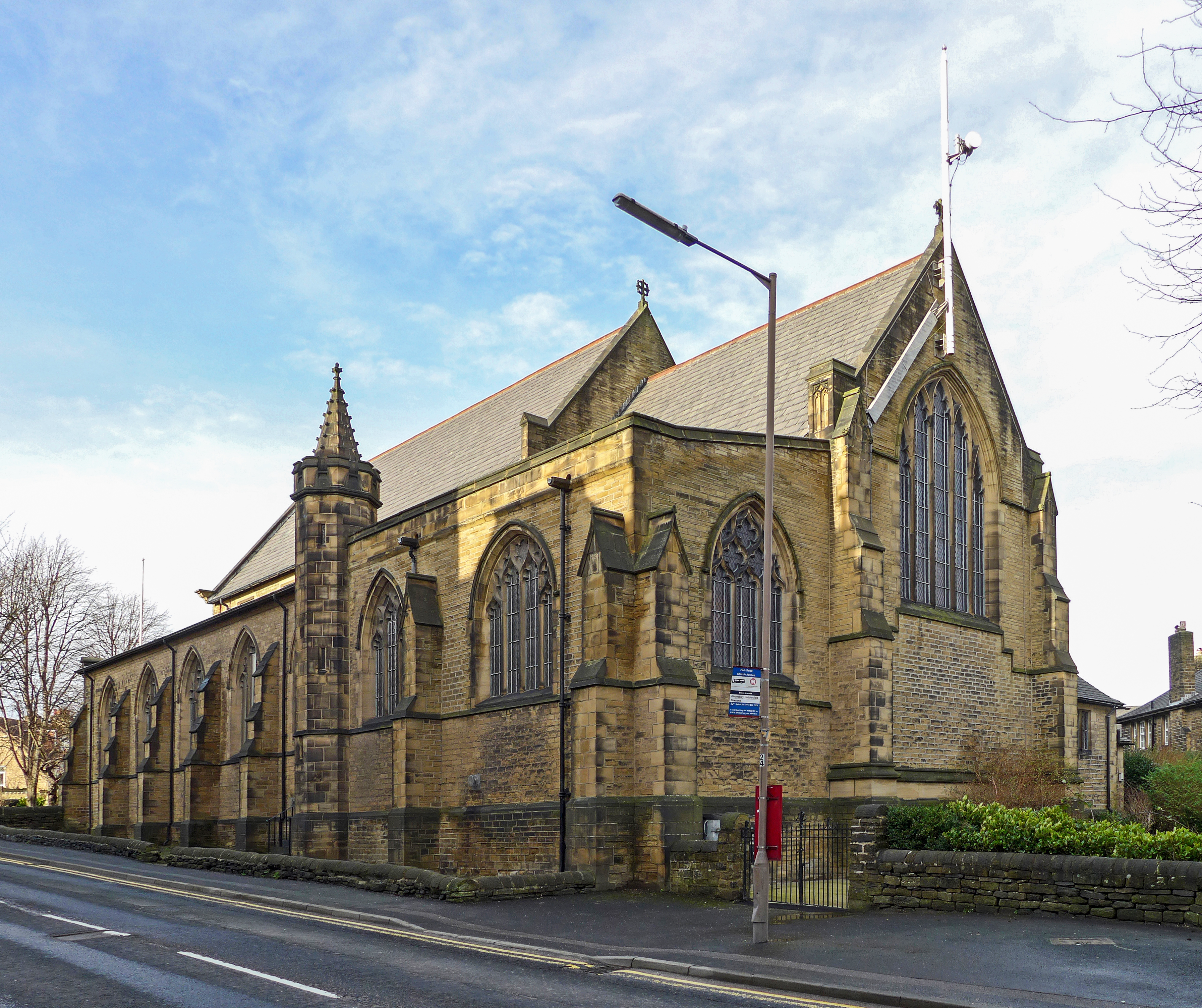 Huddersfield